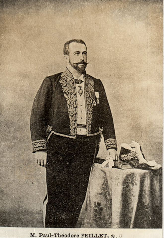 Portrait officiel du gouverneur Feillet